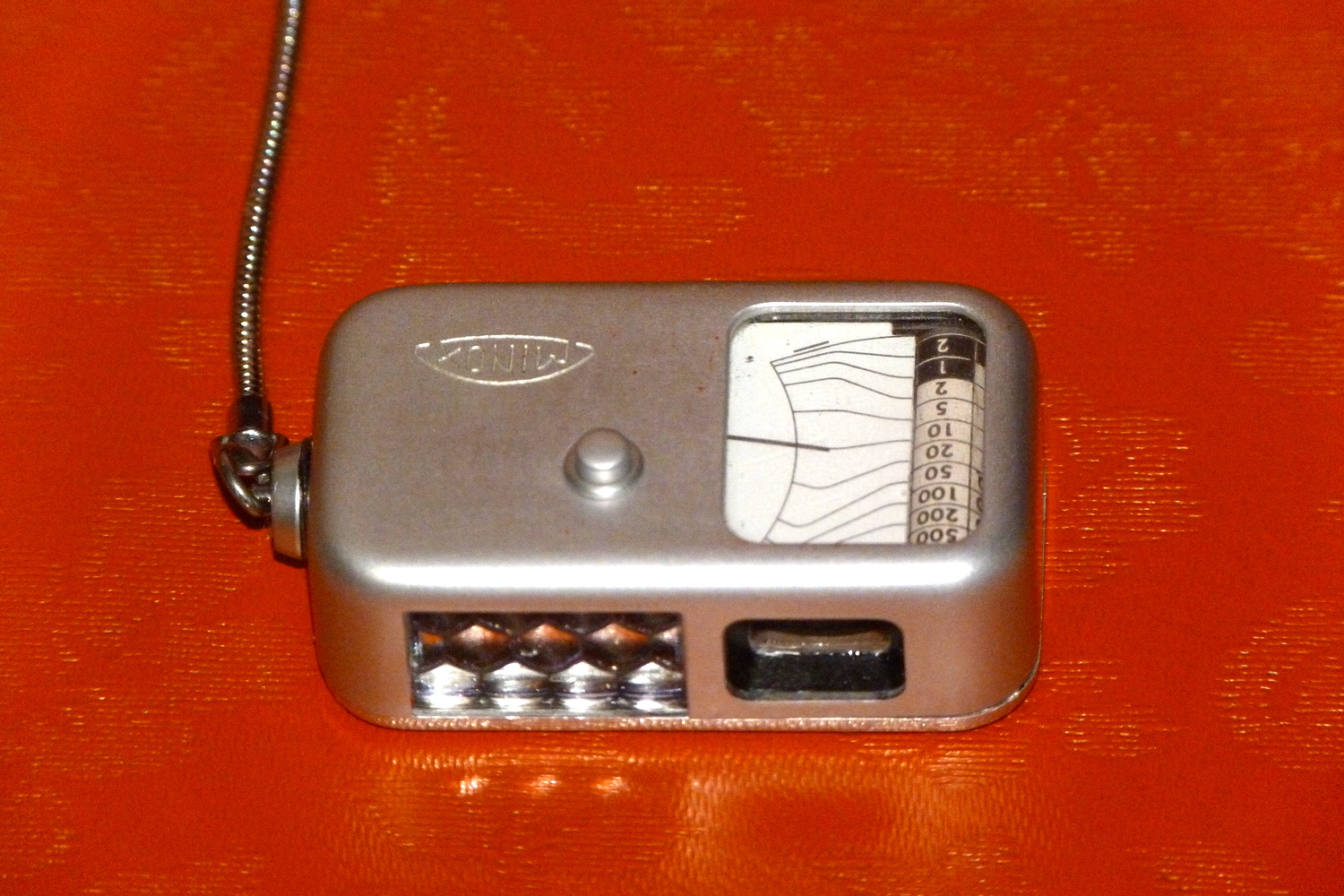 密诺斯测光表 Minox selenium exposure meter